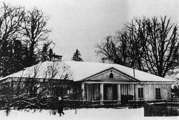 Беларуская (тарашкевіца): Лоша (Łoša), сядзіба Ходзькаў (Chodźka)